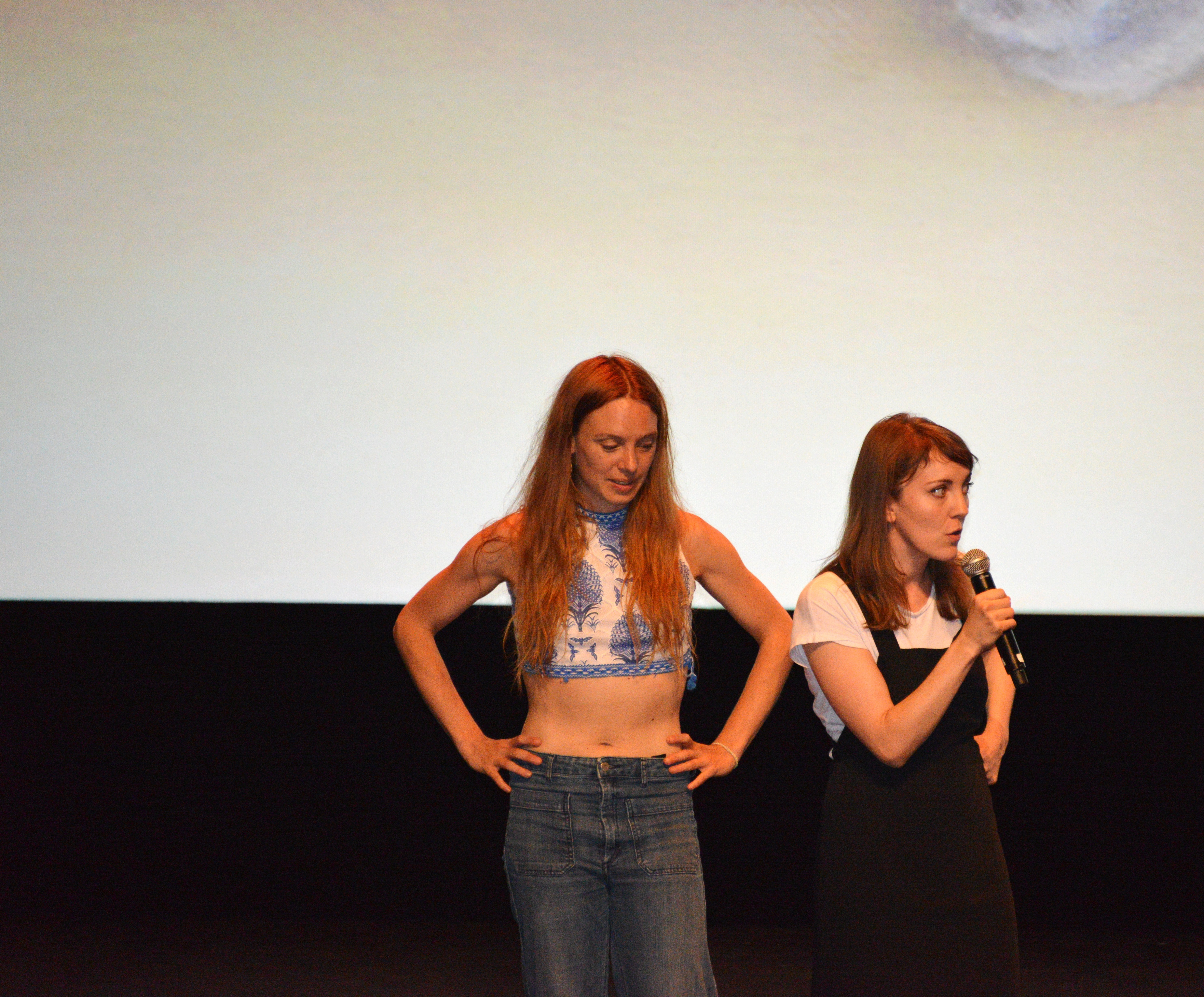 La comédienne Lætitia Dosch et la cinéaste Léonor Serraille (avec le micro) lors de la présentation de son film Jeune Femme dans la grande salle de la Coursive (scène nationale de France) le dimanche 9 juillet 2017 à 20h. Soirée de Clôture, Festival International du Film de La Rochelle 2017. La Rochelle, Charente-Maritime, France.